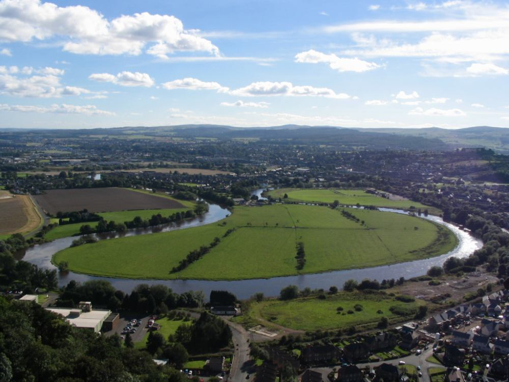 Blick auf Stirling vom Wallace Monument